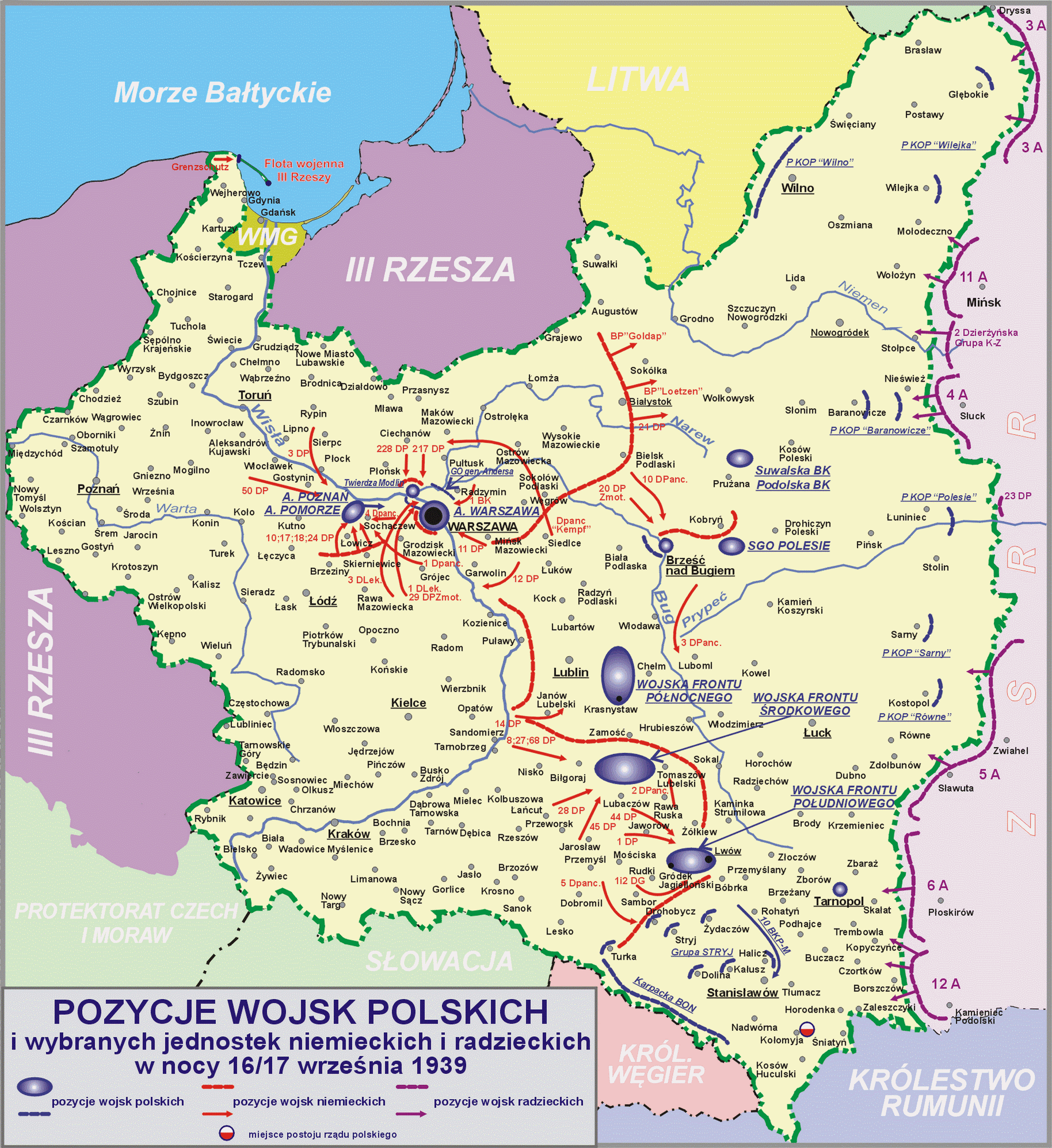 Pozycje wojsk polskich i wybranych jednostek niemieckich i radzieckich 16/17 września 1939